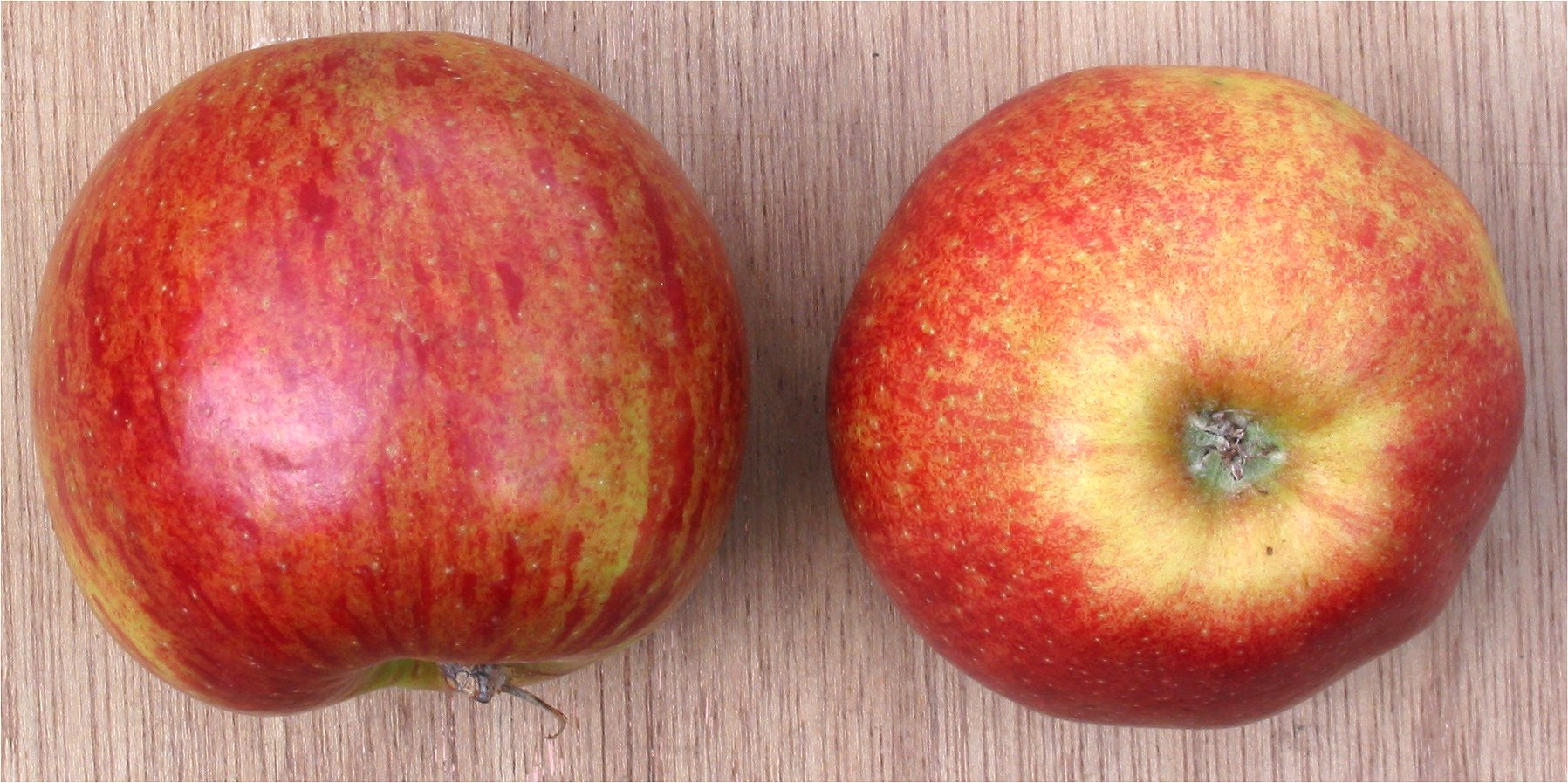 Malus pumila 'Jonagold'